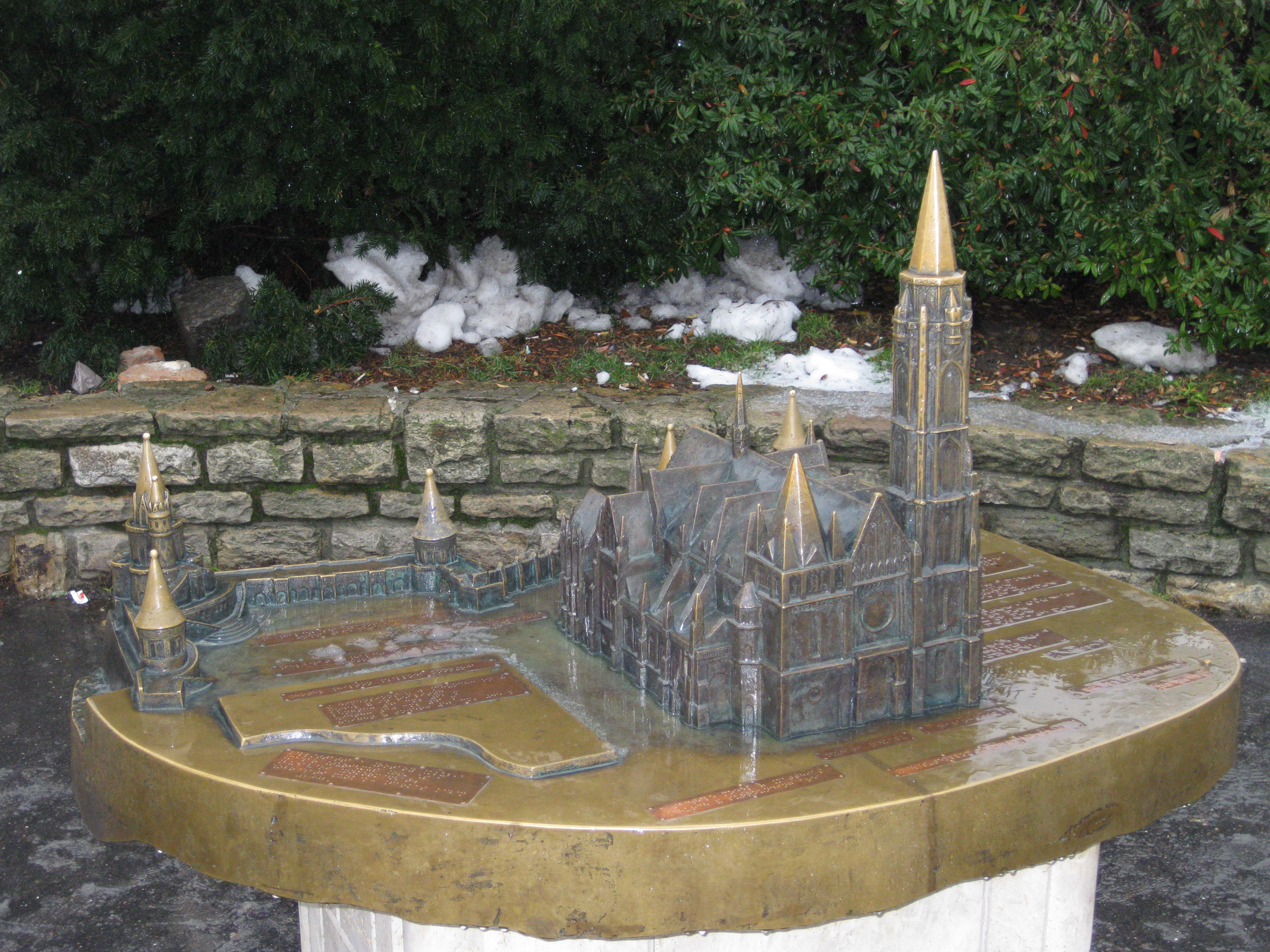 Maßstabmodell